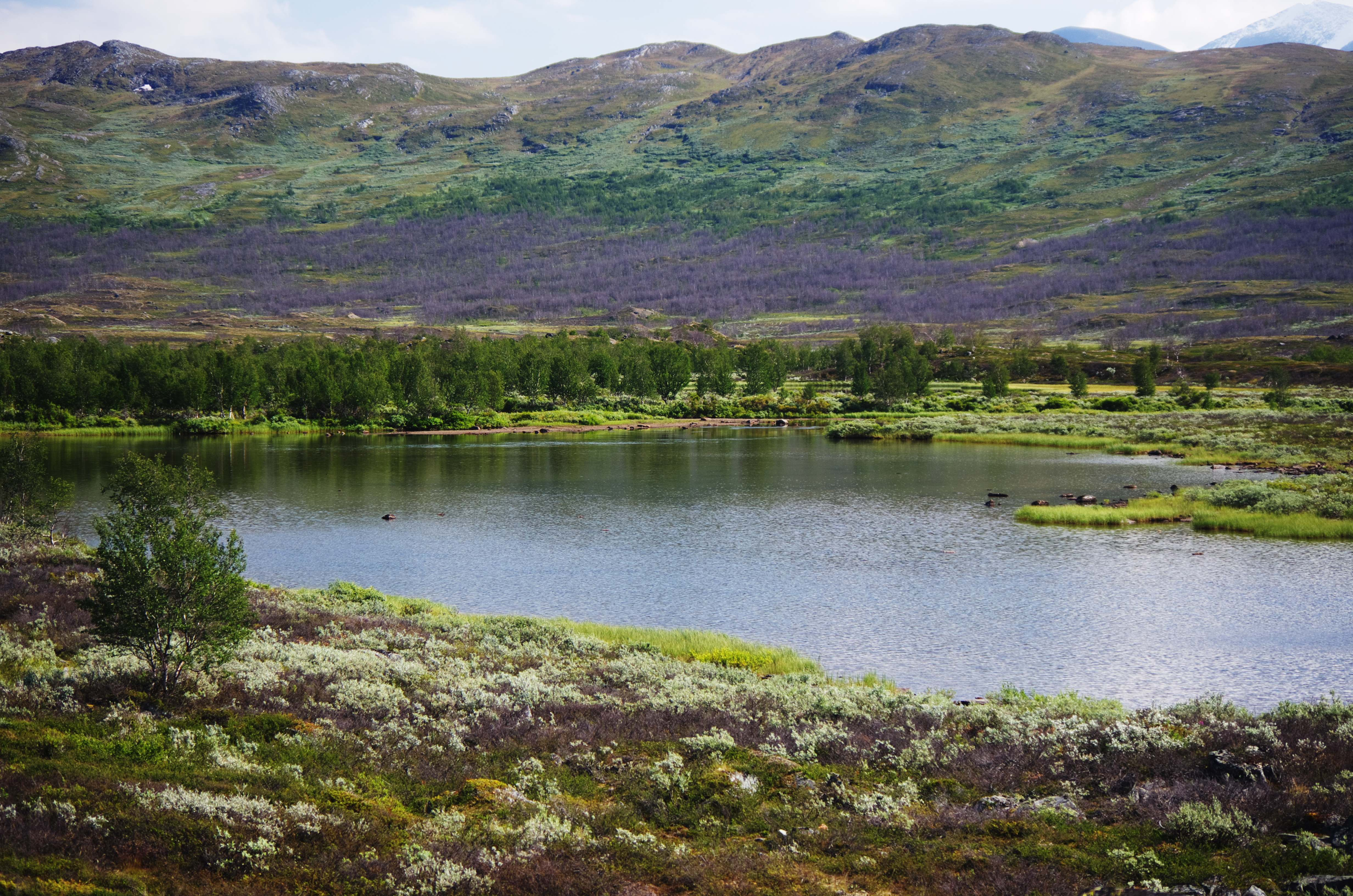 Sjön Kamajaure (Gamajávri) i Kiruna kommun i Lappland i Sverige.